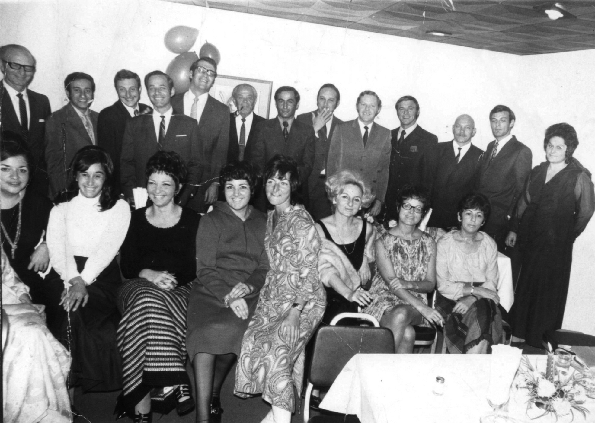 צוות אנגלו-סכסון תחילת שנות ה 70